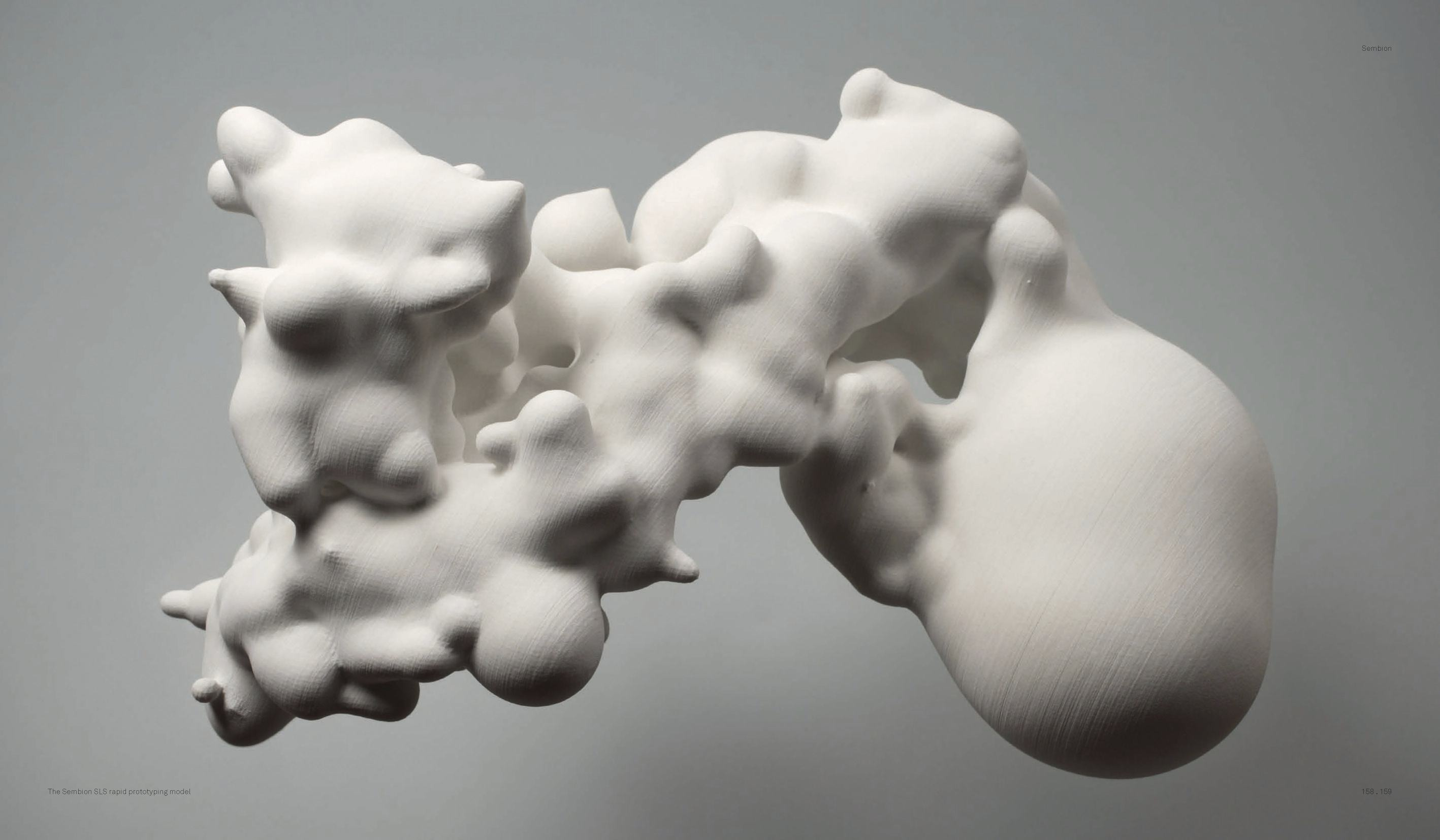 Sembion